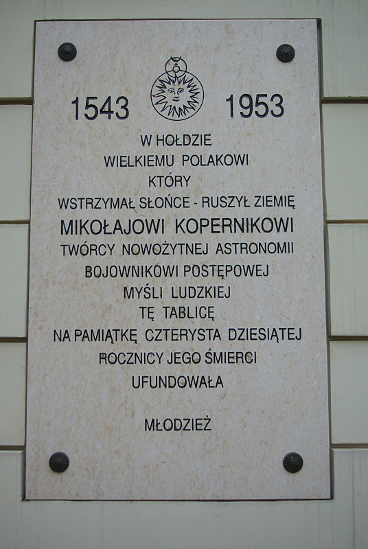 II LO Sanok tablica upamiętniająca Mikołaja Kopernika 1543-1953 (410 rocznica śmierci)